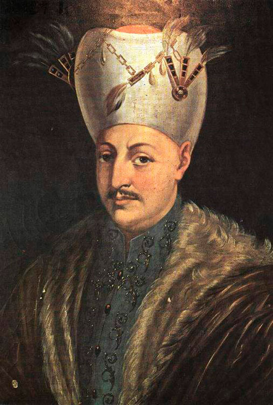 صورة للسلطان أحمد في شبابه